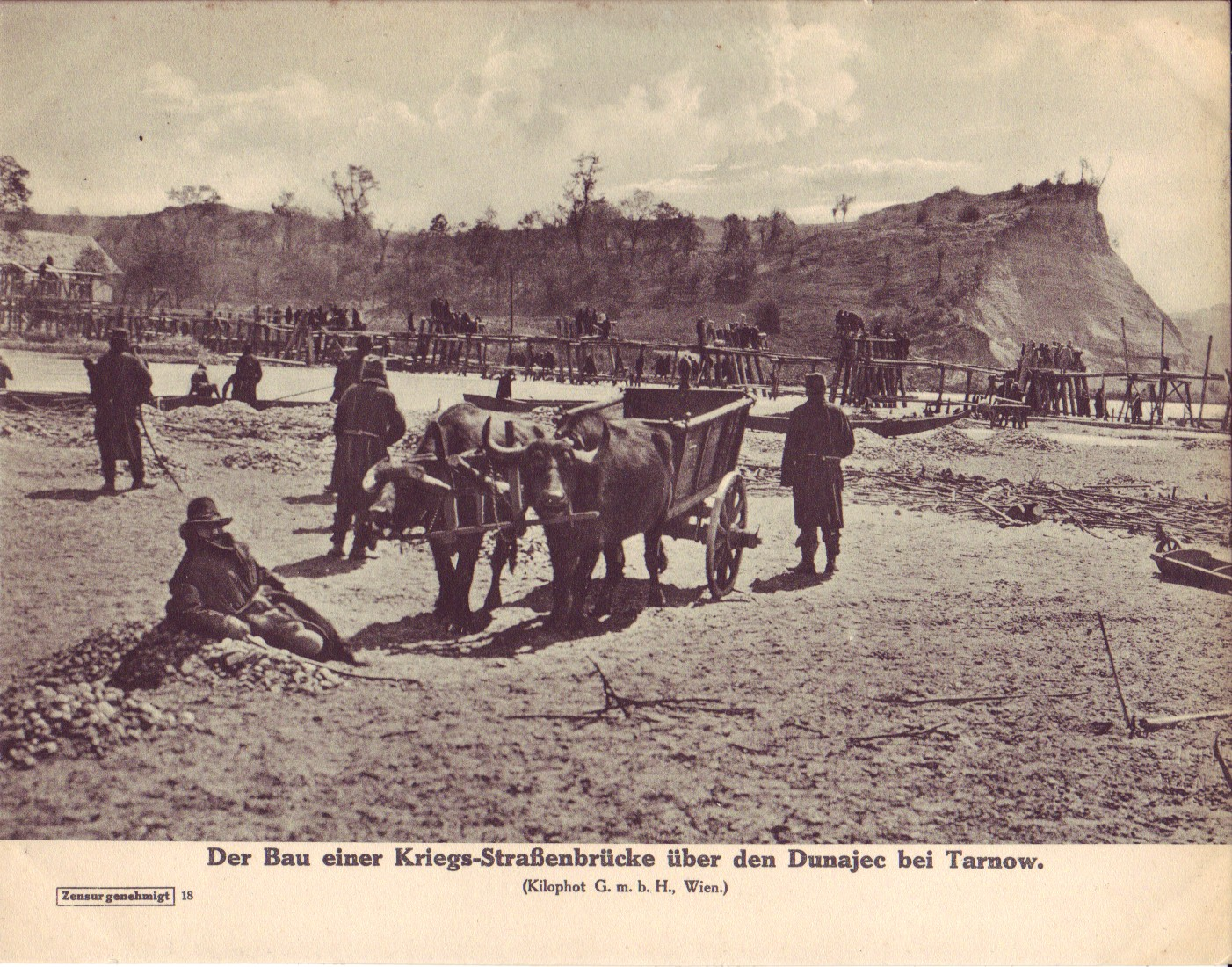 Postkarte